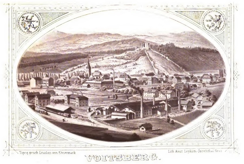 Um 1850 von Carl Reichert geschaffene Tonlithographie von Voitsberg, welche in Josef Andreas Janischs "Topographisch-statistisches Lexikon von Steiermark, mit historischen Notizen und Anmerkungen" veröffentlicht wurde.